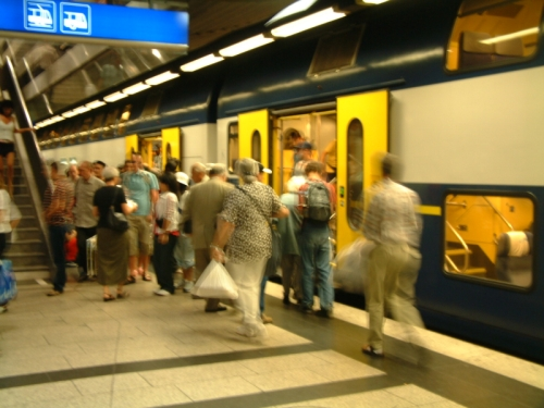 Duetaĝa regiontrajno en la subtera haltejo sub la ĉef-stacidomo de Zuriko. La dosiero estas kopiita el la germana Vikipedio, kie ĝi estas publikigita laŭ la kondiĉoj de la GFDL-permesilo de GNU 1.2. [1] Kategorio:Bildoj de Kantono Zuriko Kategorio:Bildoj alŝutitaj de DidiWeidmann